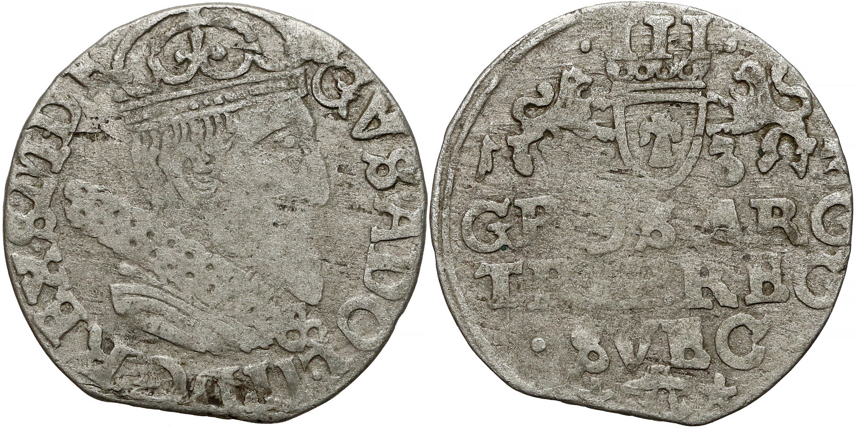 Trojak 1633 Elbląg Gustaw II Adolf